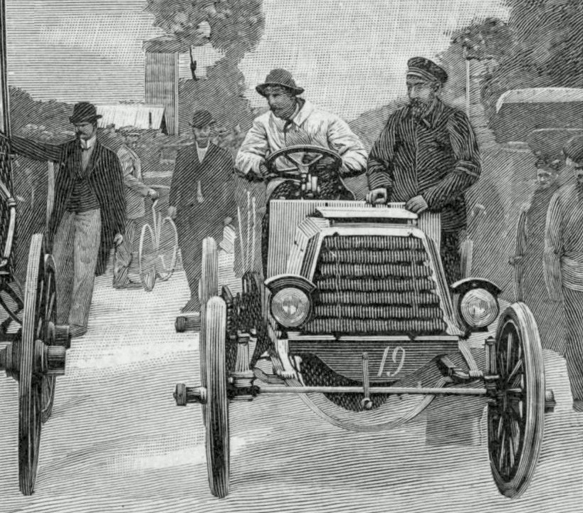 Le Comte Gaston de Chasseloup-Laubat, au TdF 1899 (3e sur Panhard) - Le Monde Illustré du 29 juillet 1899, p.84